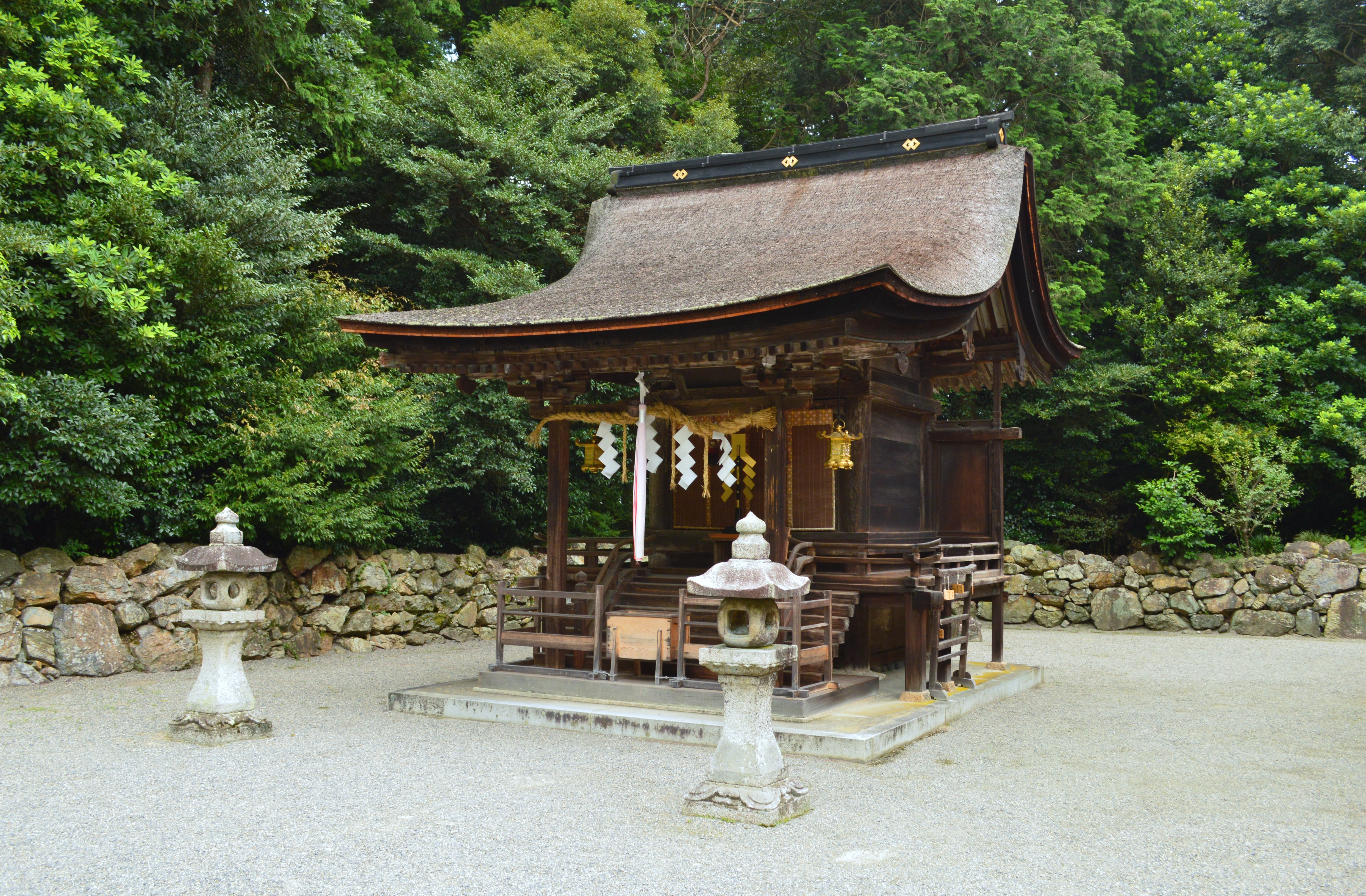 御上神社 境内若宮神社